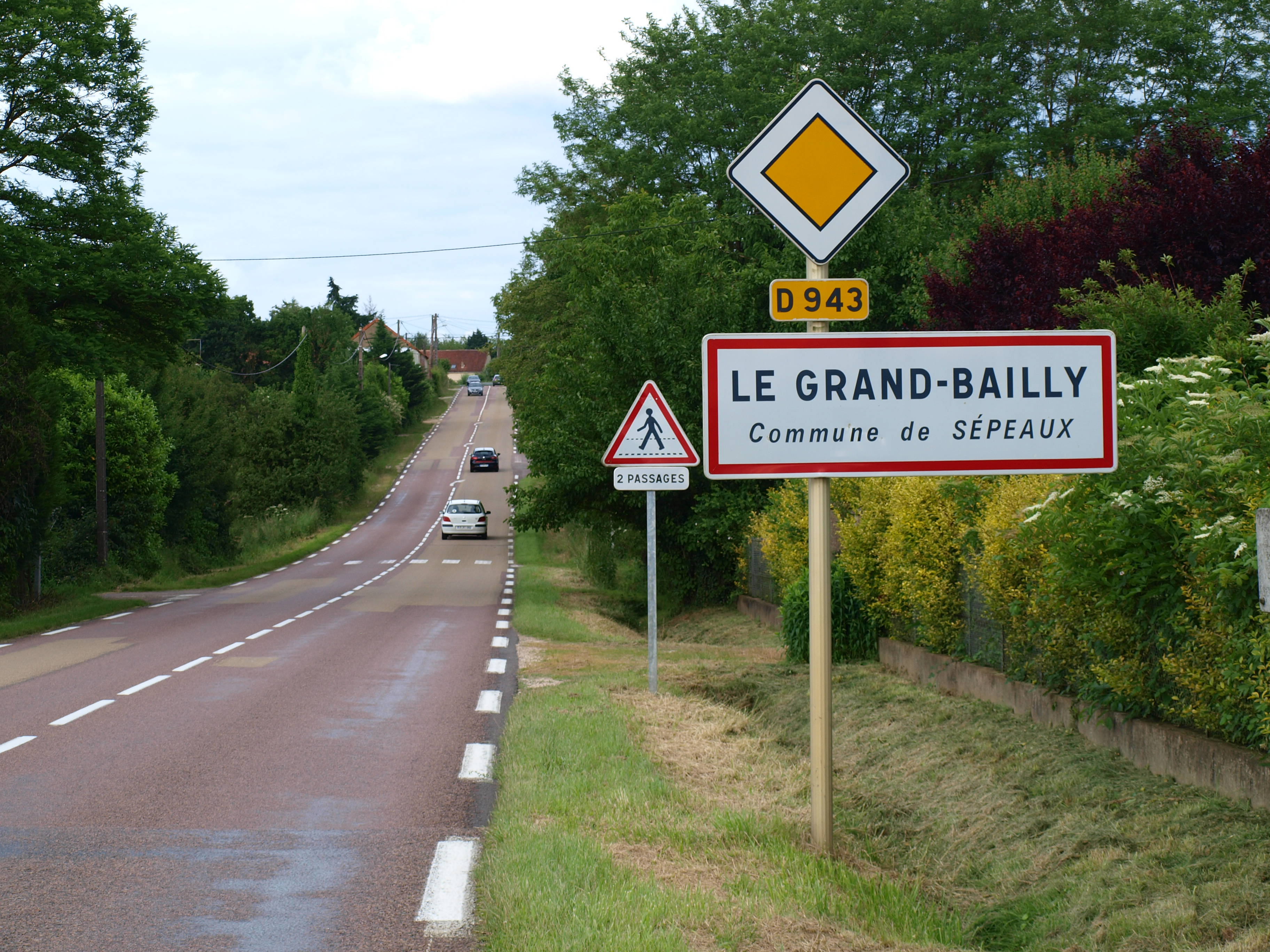 Sépeaux (Yonne, France) , Le Grand-Bailly.